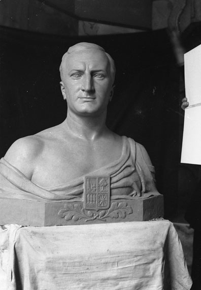 Joseba Andoni Agirre Lekube Lehendakaria. The Lehendakari Jose Antonio Agirre Lekube.